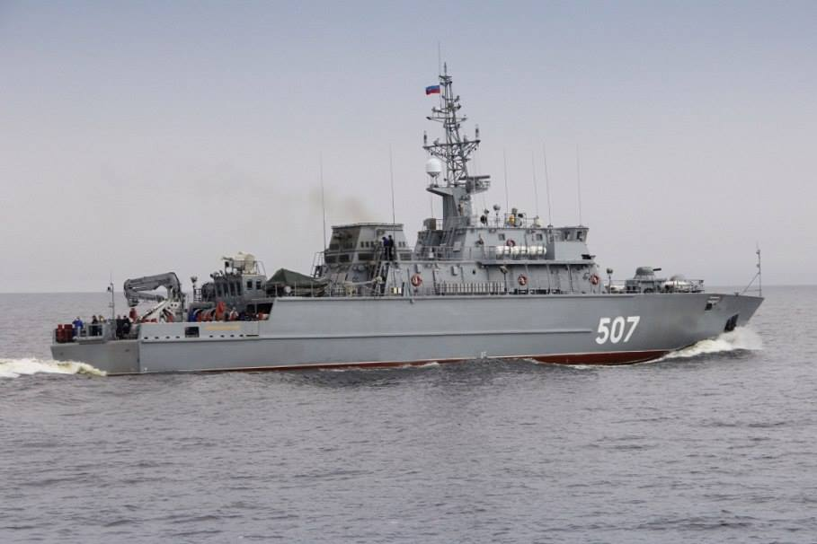 морской тральщик проекта 12700 "Александр Обухов"